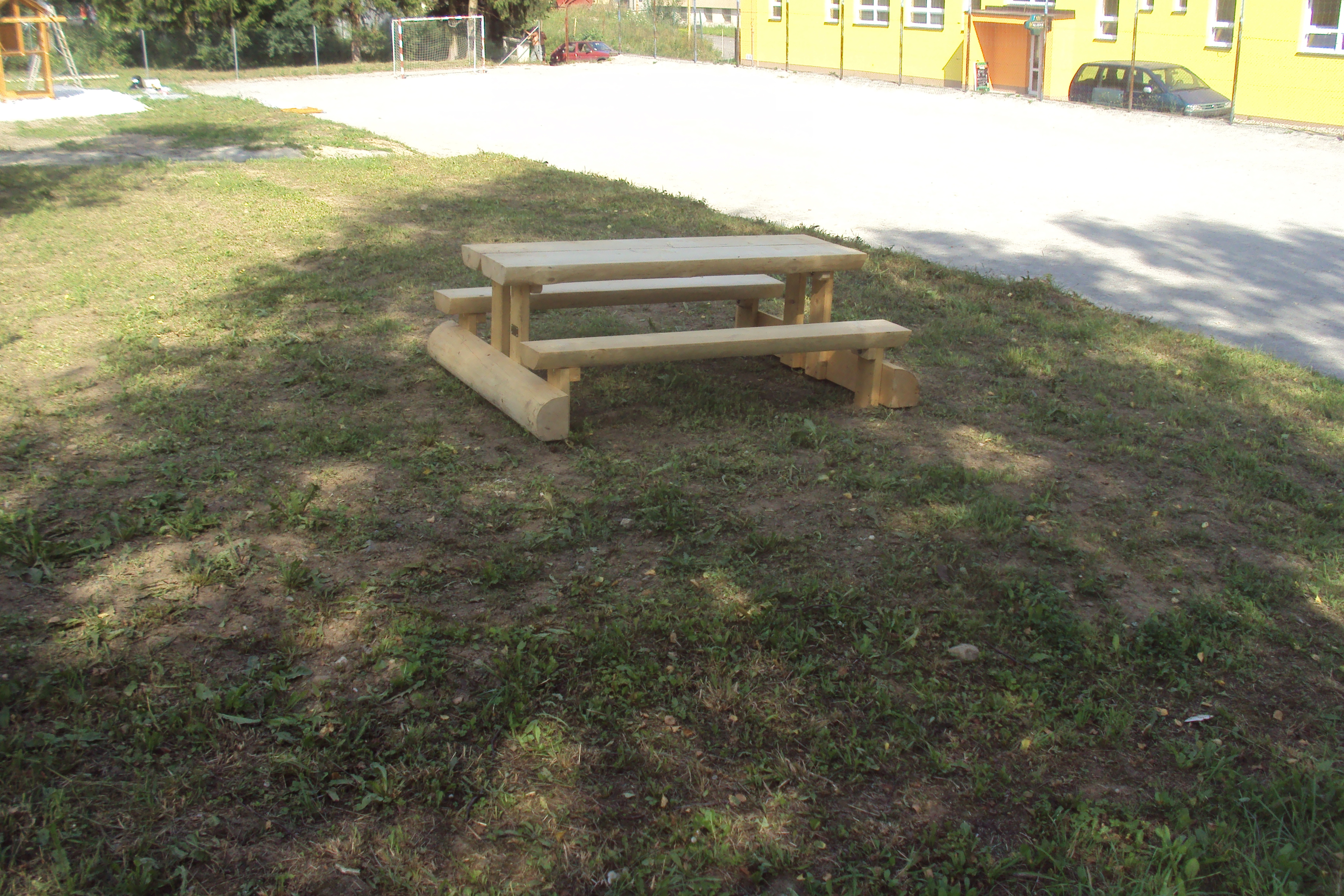 Instalováno posezení do areálu hřiště